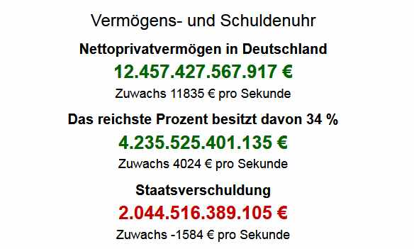 Dieses Bild ist ein Screenshot einer deutschen Vermögens-, Verteilungs- und Schuldenuhr.